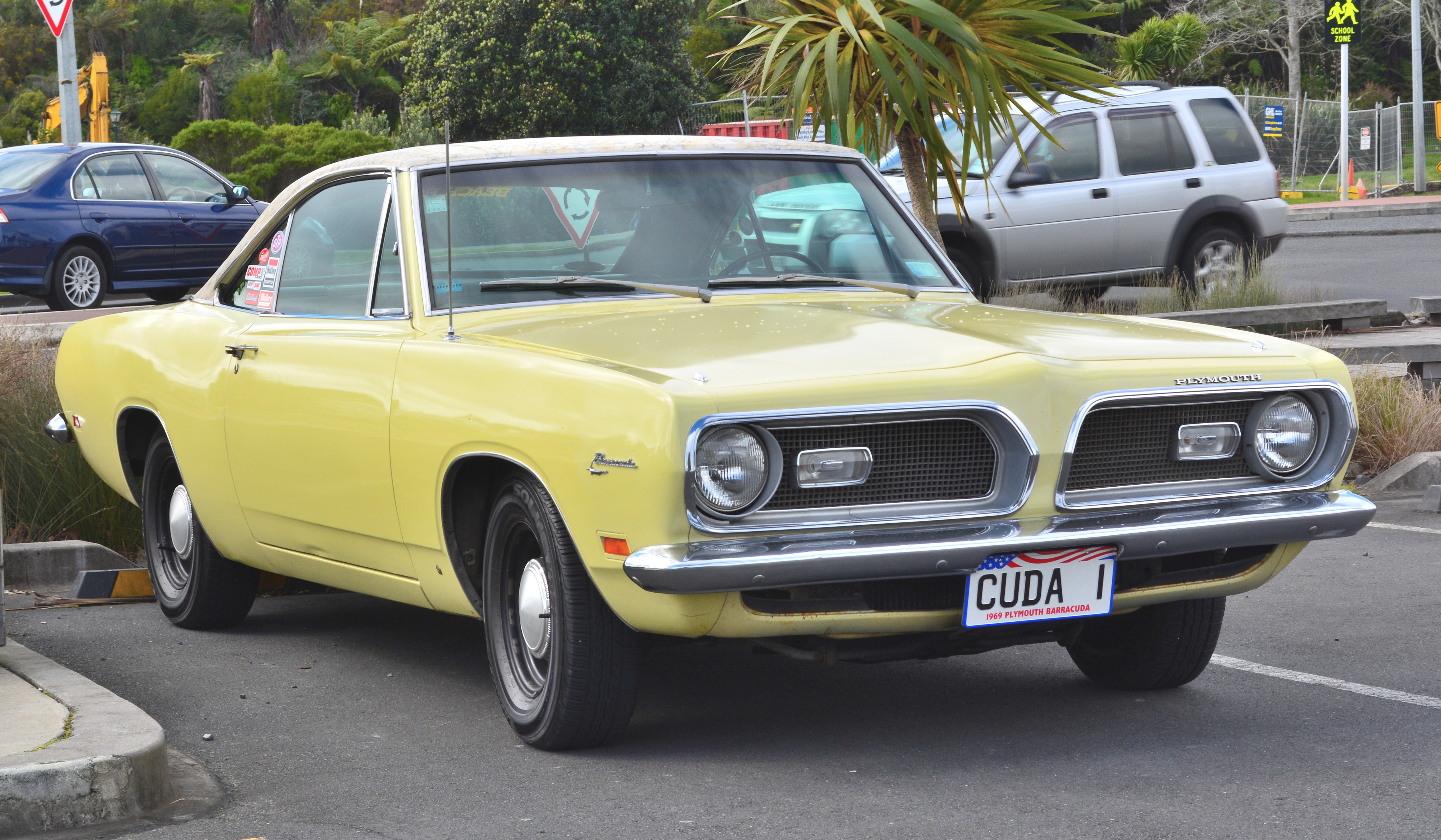 Waiuku,New Zealand